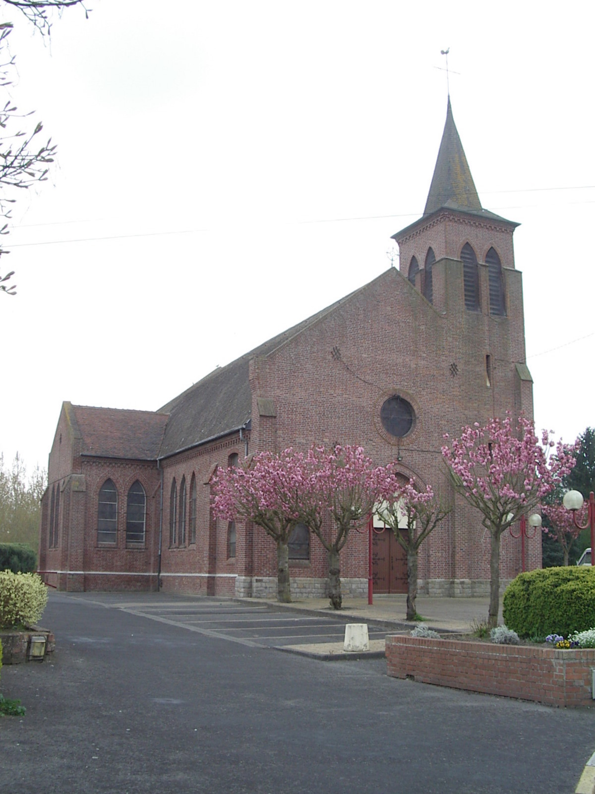 Eglise Saint-Martin d'Annequin (Pas-de-Calais, France)